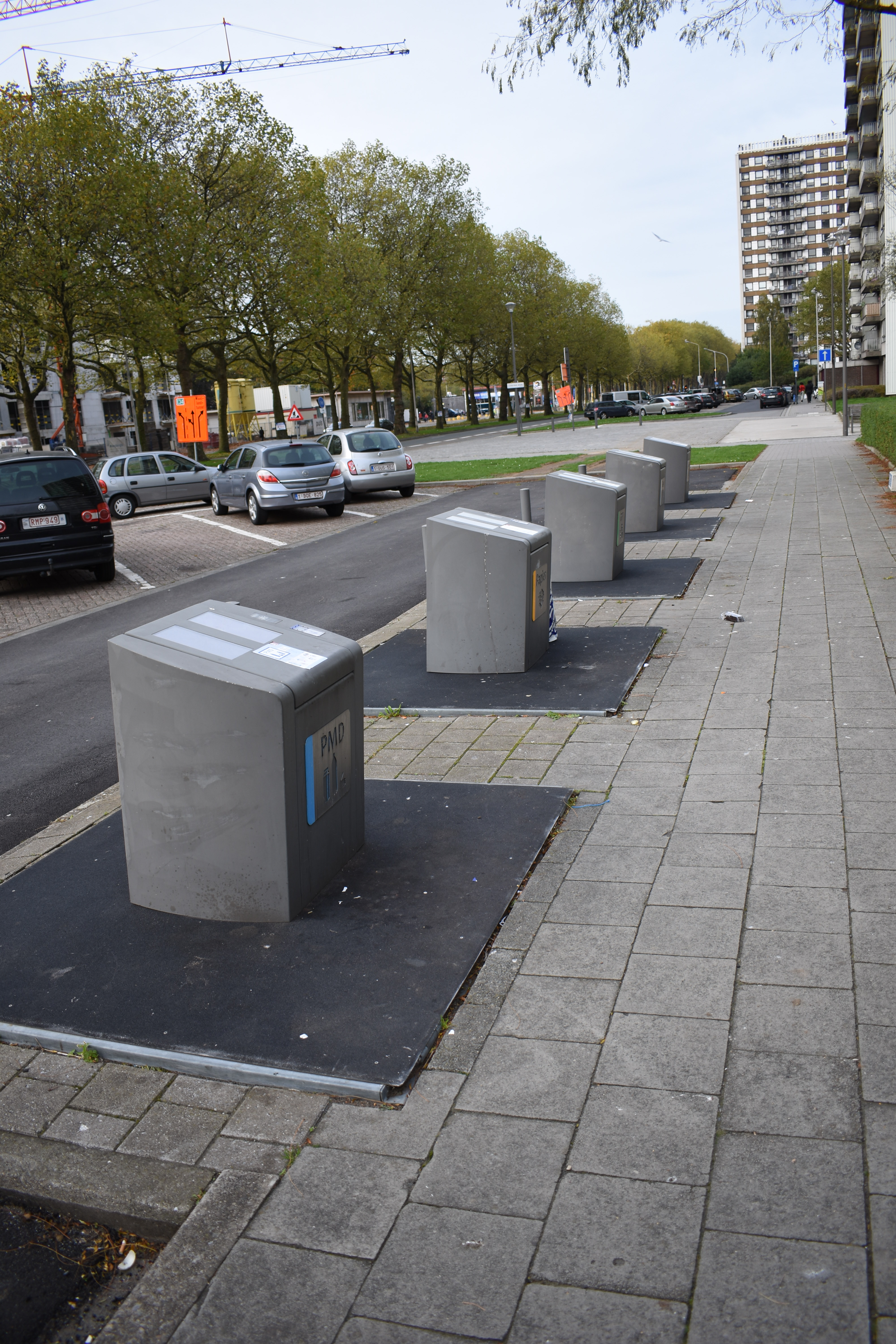 Sorteerstraat met 5 selecties: PMD, GFT, rest, glas, papier. Halewijnlaan.